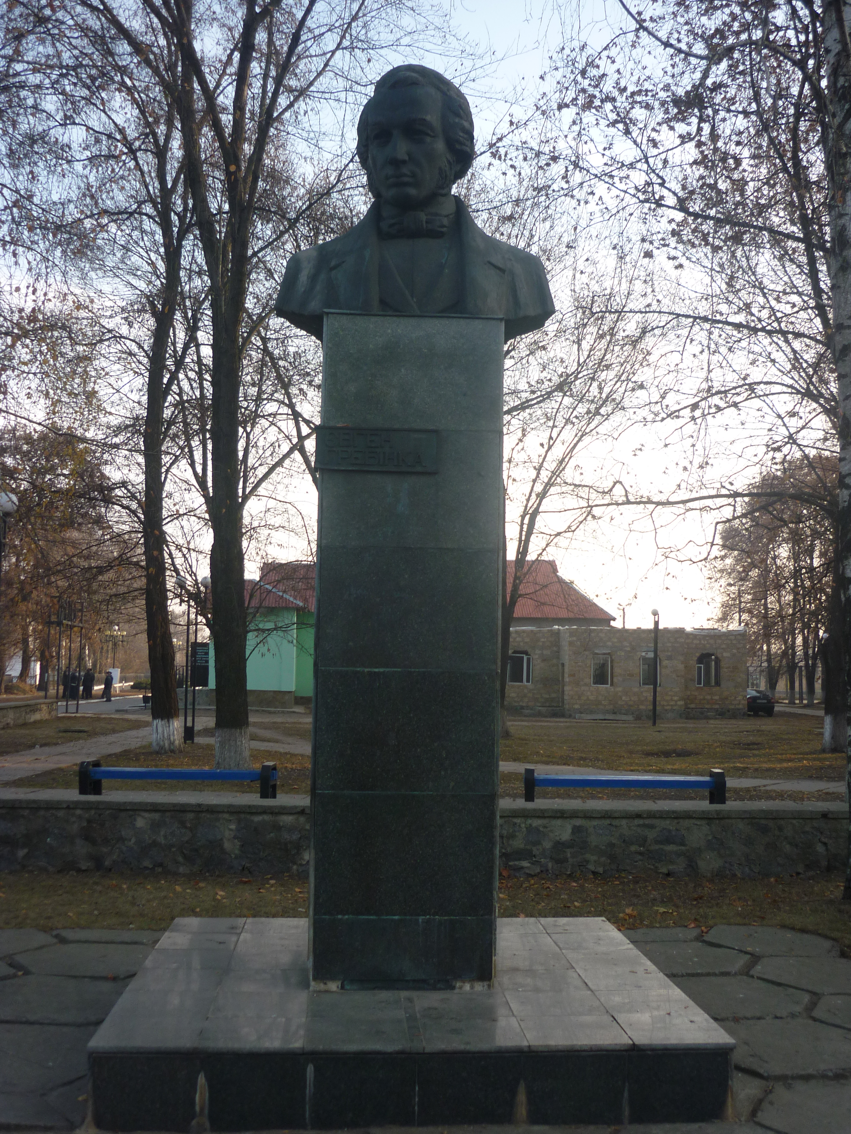 Пам'ятник Гребінці Є.П. в місті Гребінка Полтавської області